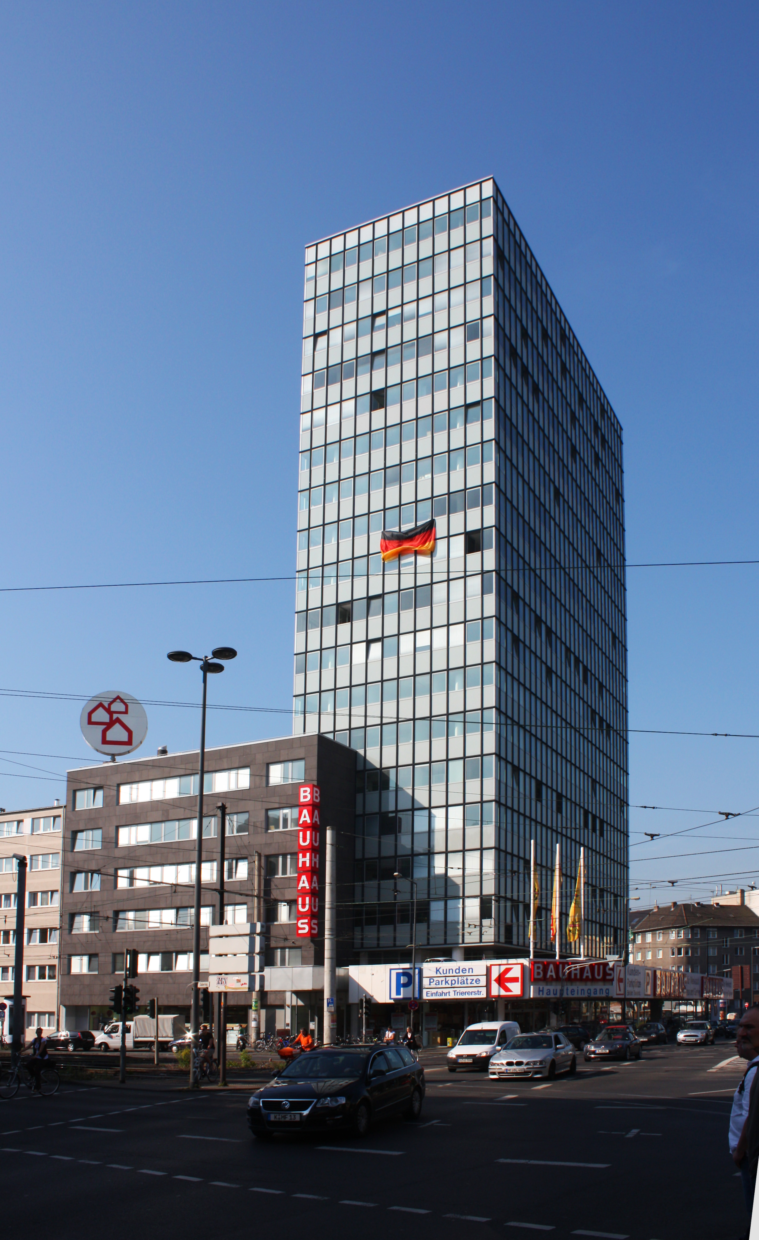 Tausend-Fenster-Turm, Salierring/Barbarossaplatz, Köln